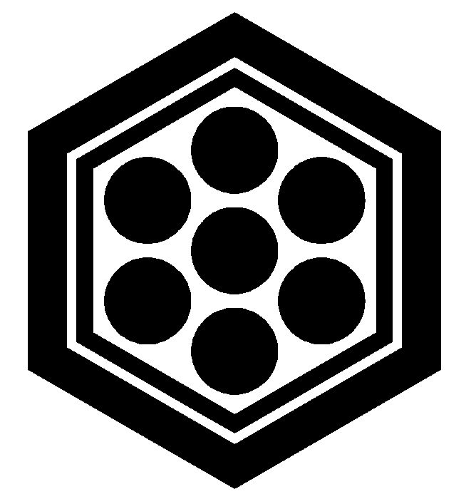 日本の家紋、亀甲に七曜